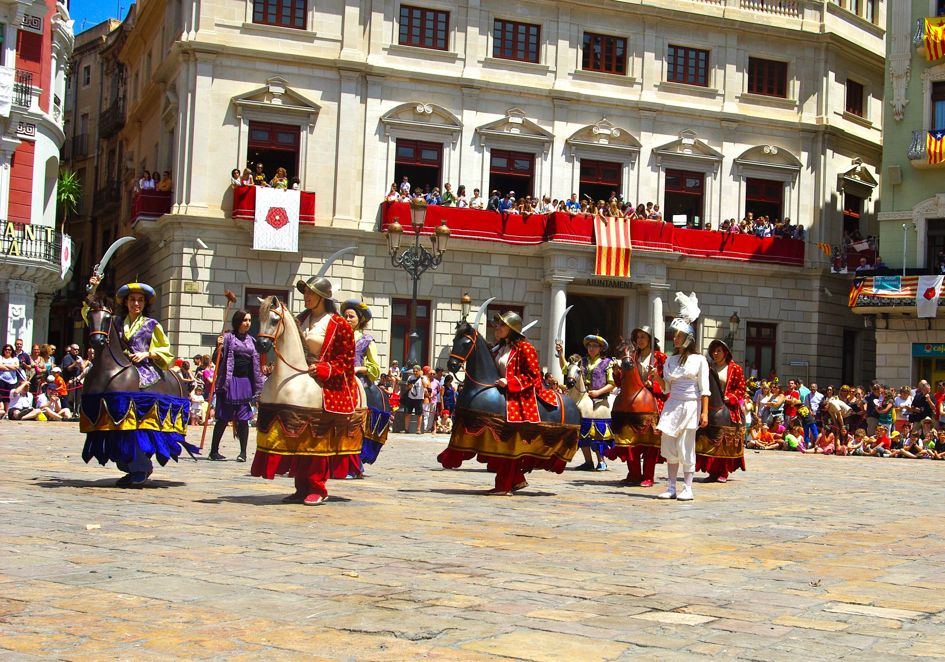 Ball de Cavallets. Sant Pere 2014